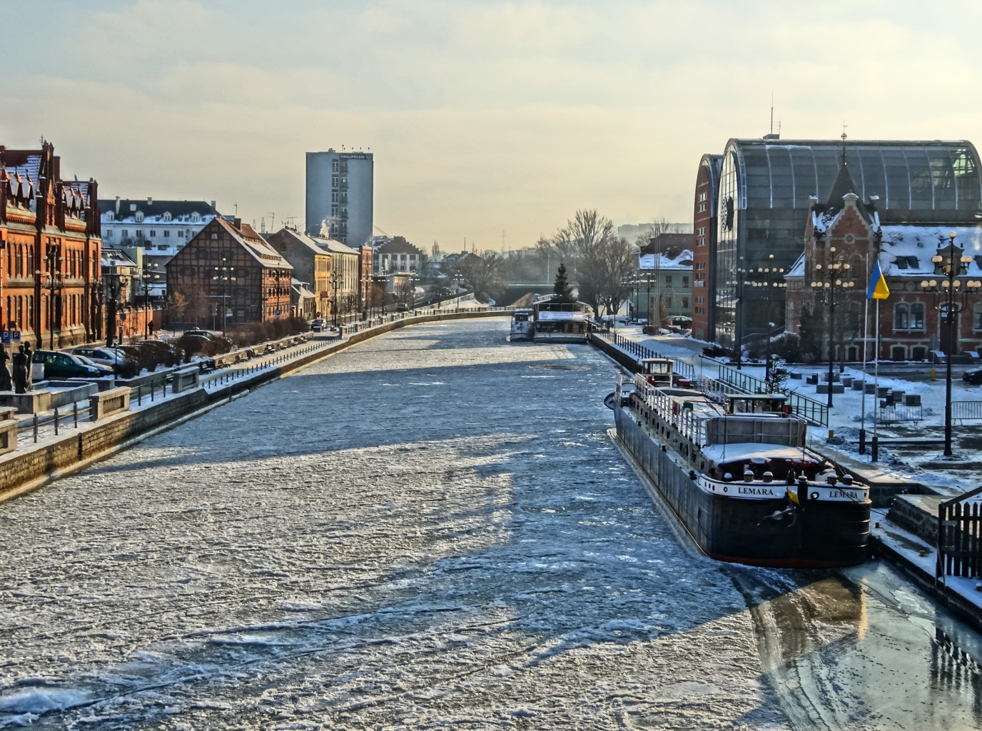 Widok z mostu Staromiejskiego w Bydgoszczy w kierunku wschodnim